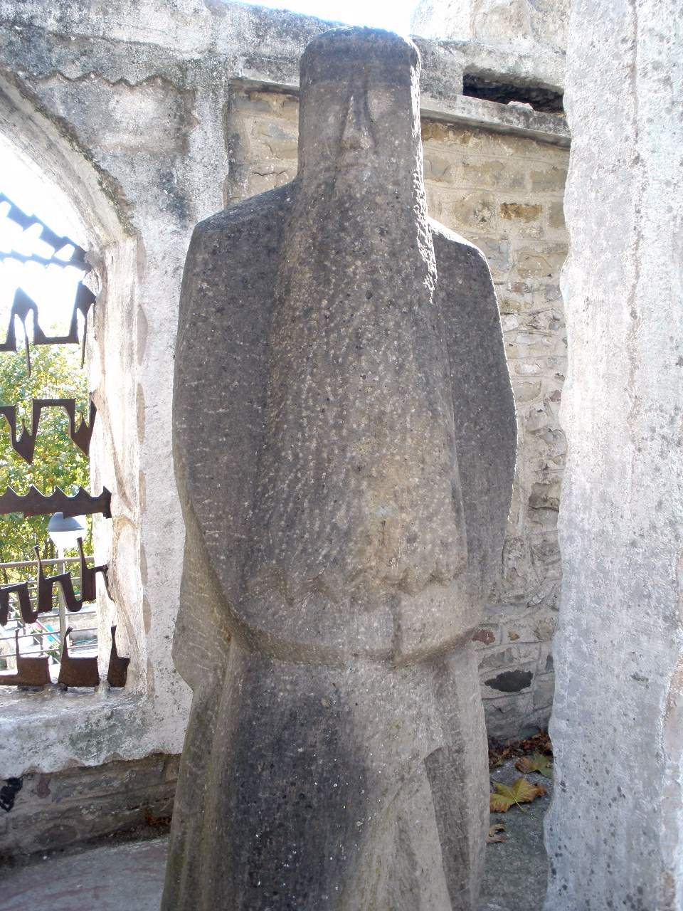 Convento de los Capuchinos Extramuros (Pamplona)